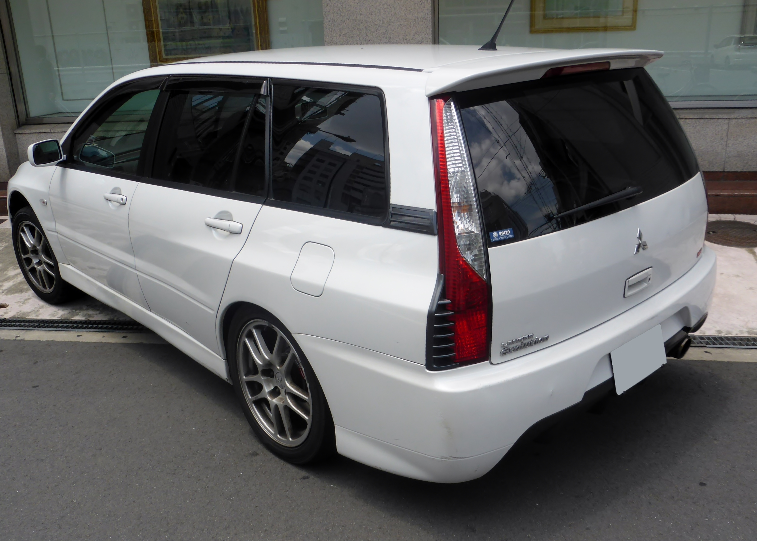 CT9W型三石・ランサーエボリューションワゴンMR GT-Aをリアから撮影。